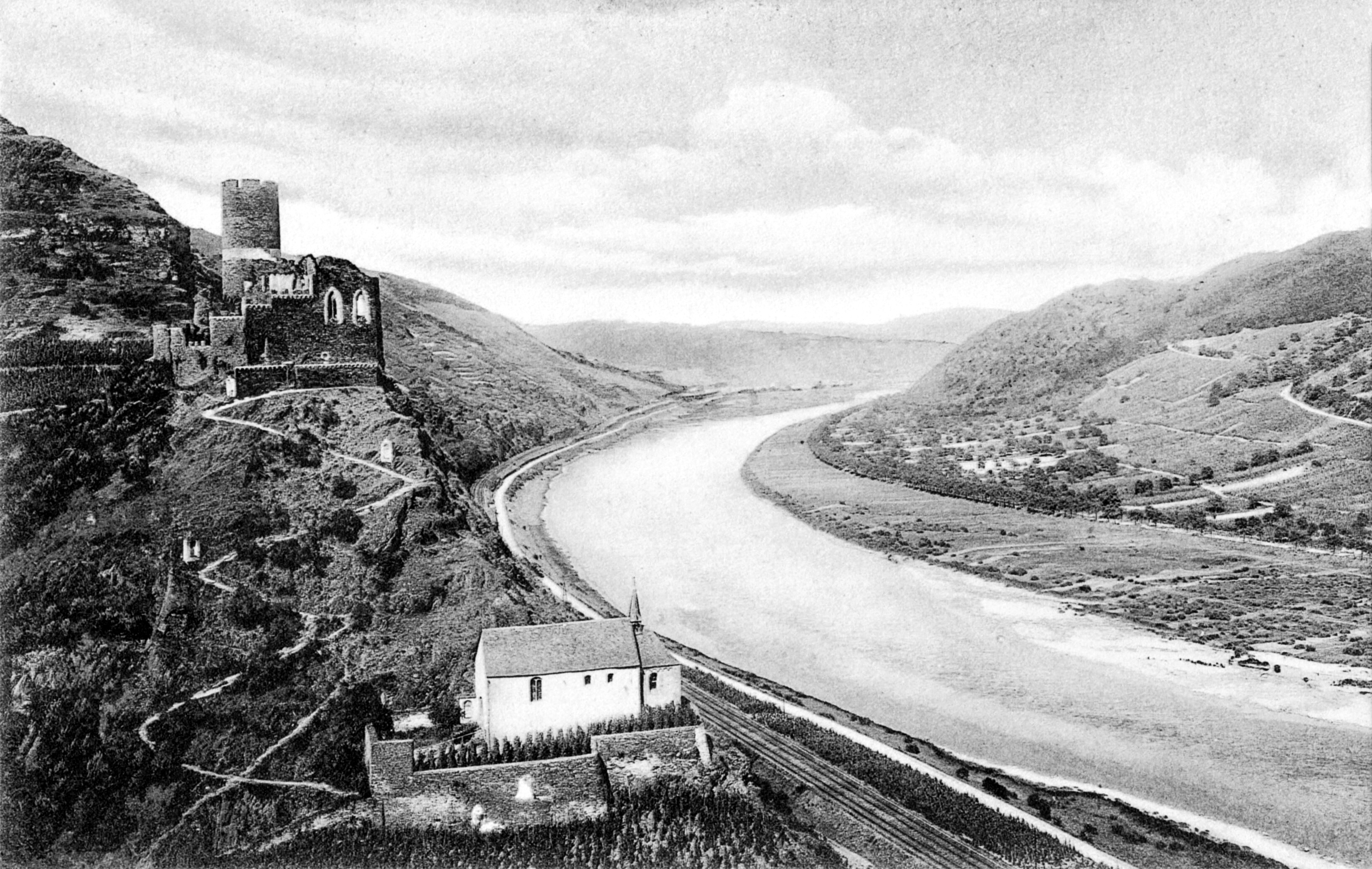 Ruine von Bischofstein mit Pauluskapelle, um 1900. Blick moselabwärts